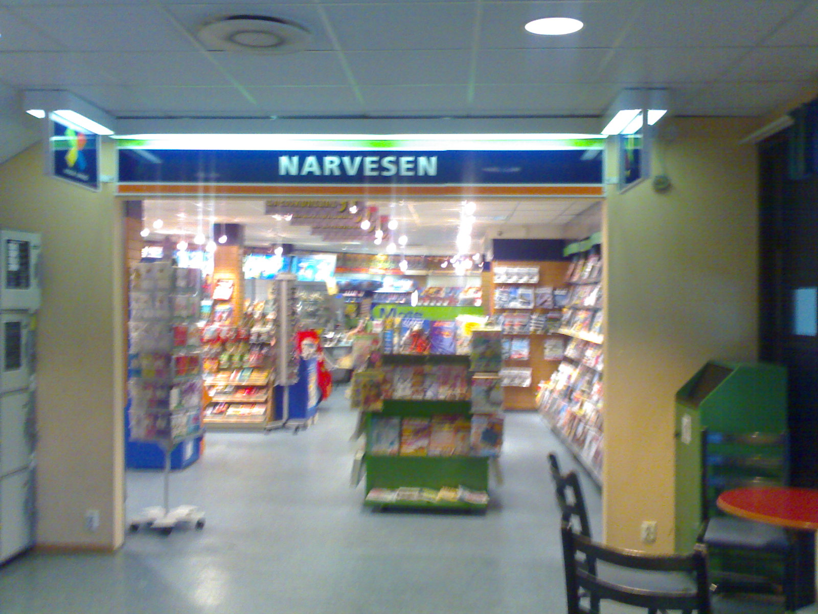 Narvesen-butikk på rutebilstasjonen i Førde.